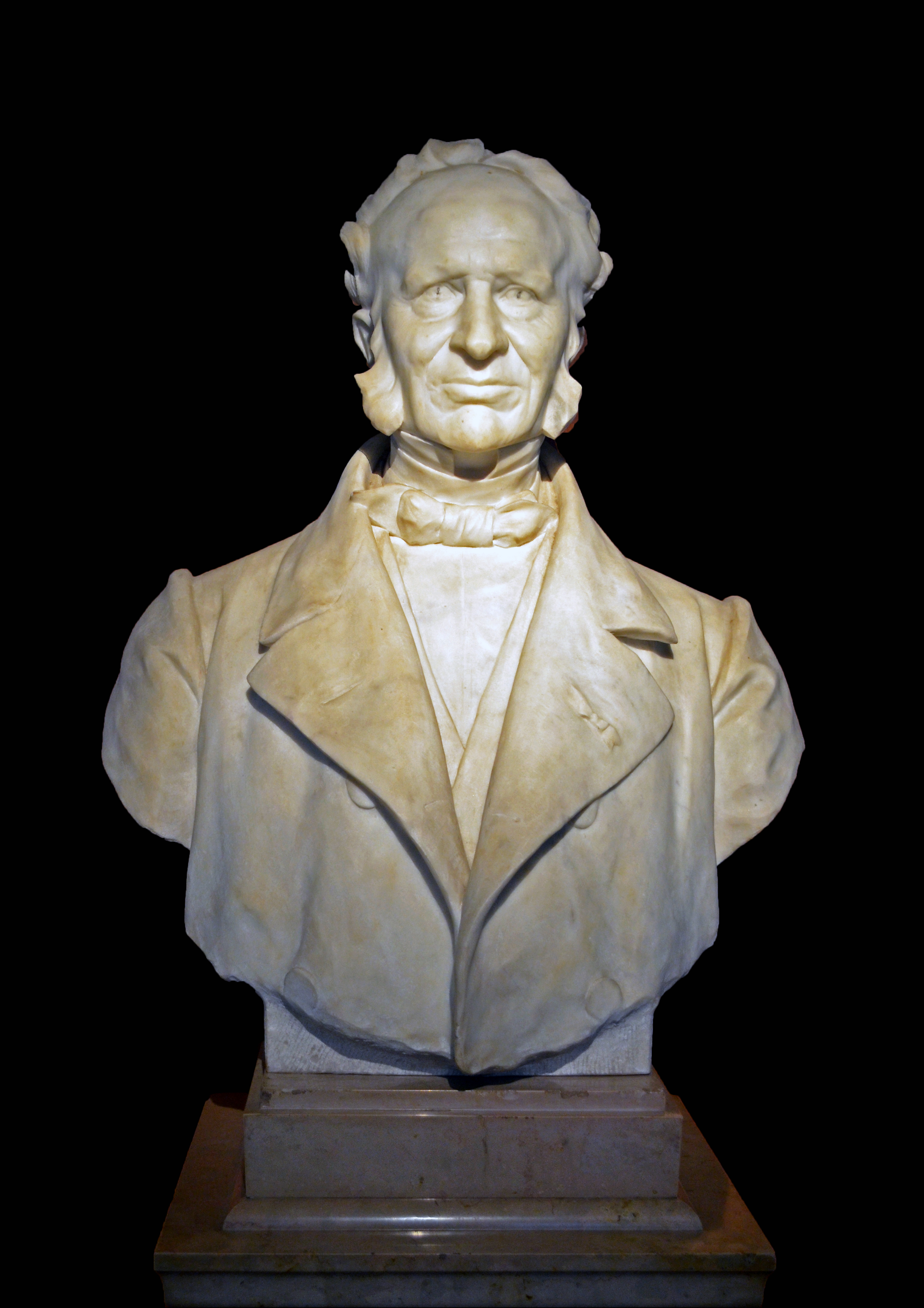 Buste de Frédéric Cailliaud (1787-1869), conservateur du Muséum d'histoire naturelle de Nantes.